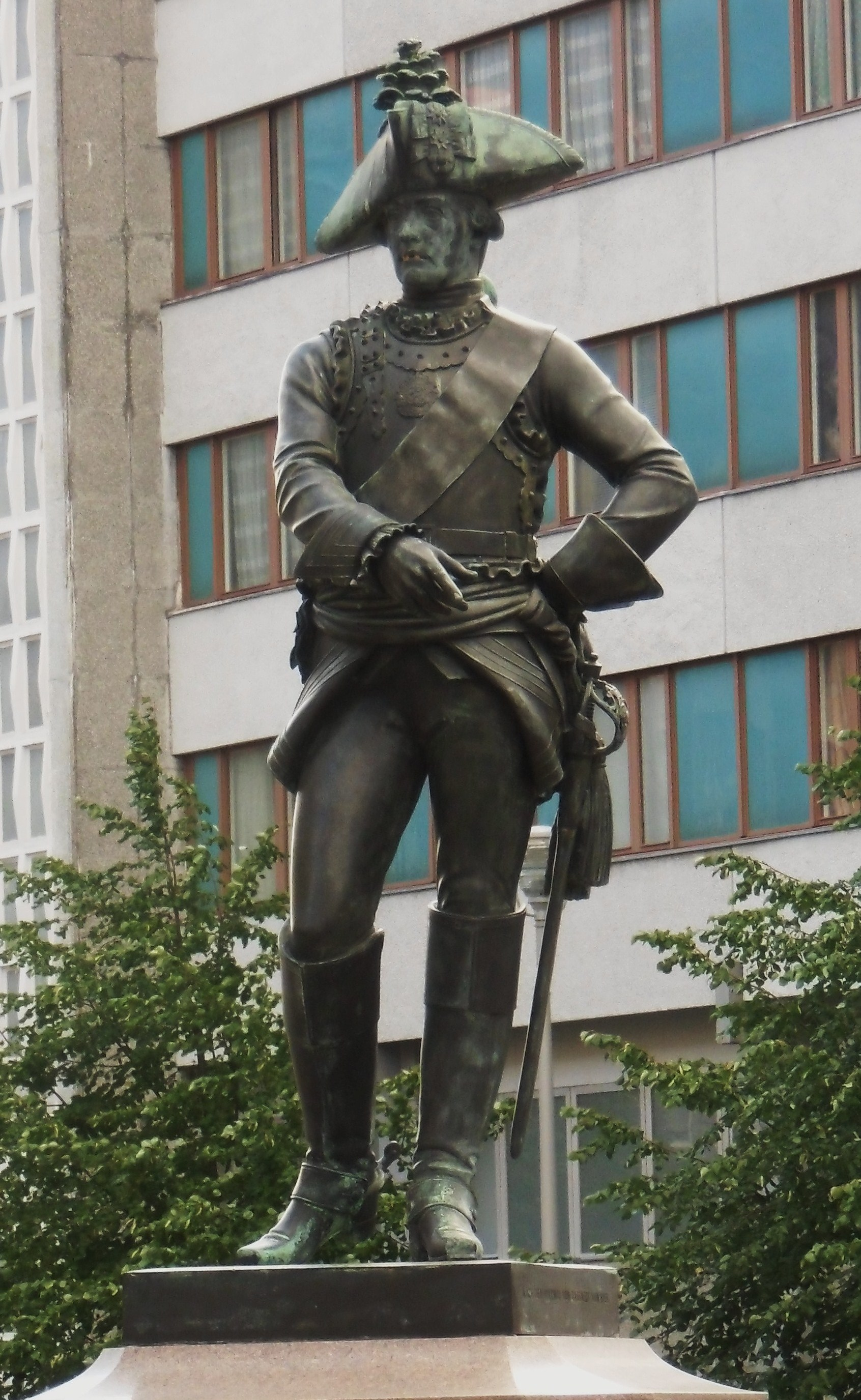 Originaldenkmal in Marmor erschaffen von Jean Pierre Antoine Tassaert, 1781 auf dem ehemaligen Berliner Wilhelmplatz aufgestellt, 1862 durch eine Bronzekopie von August Kiss ersetzt, 2009 auf dem Berliner Zietenplatz wieder errichtet.